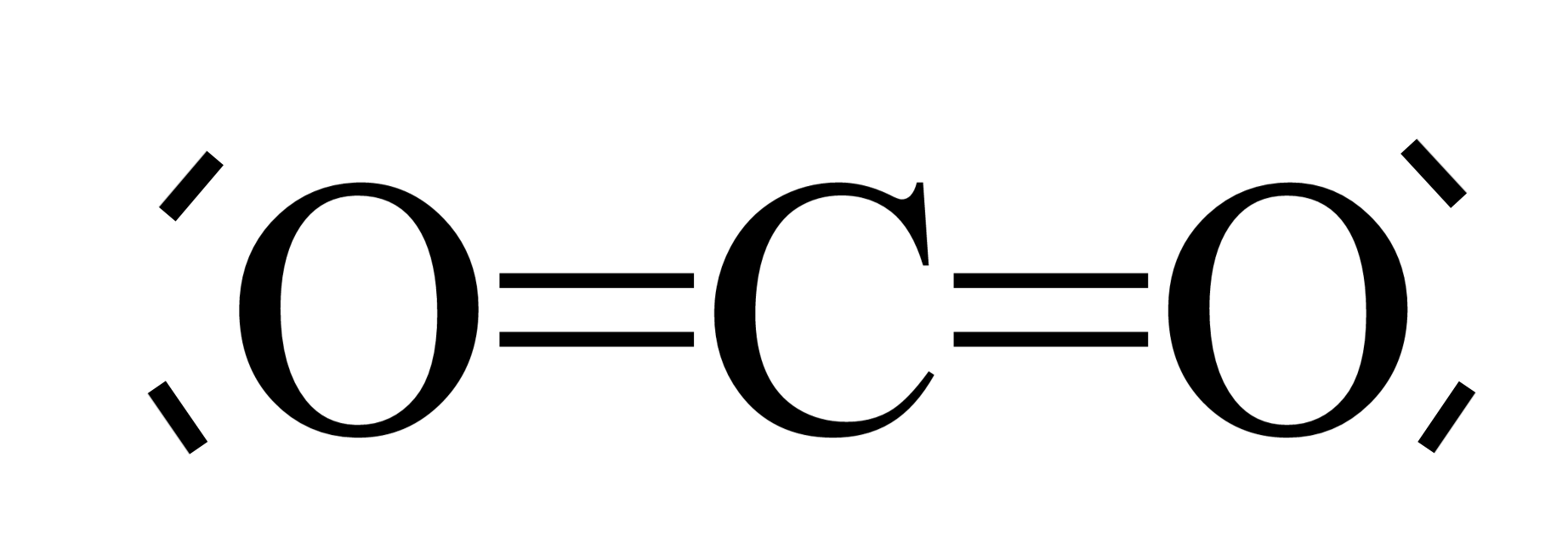 تصویر کربن دی اکسید